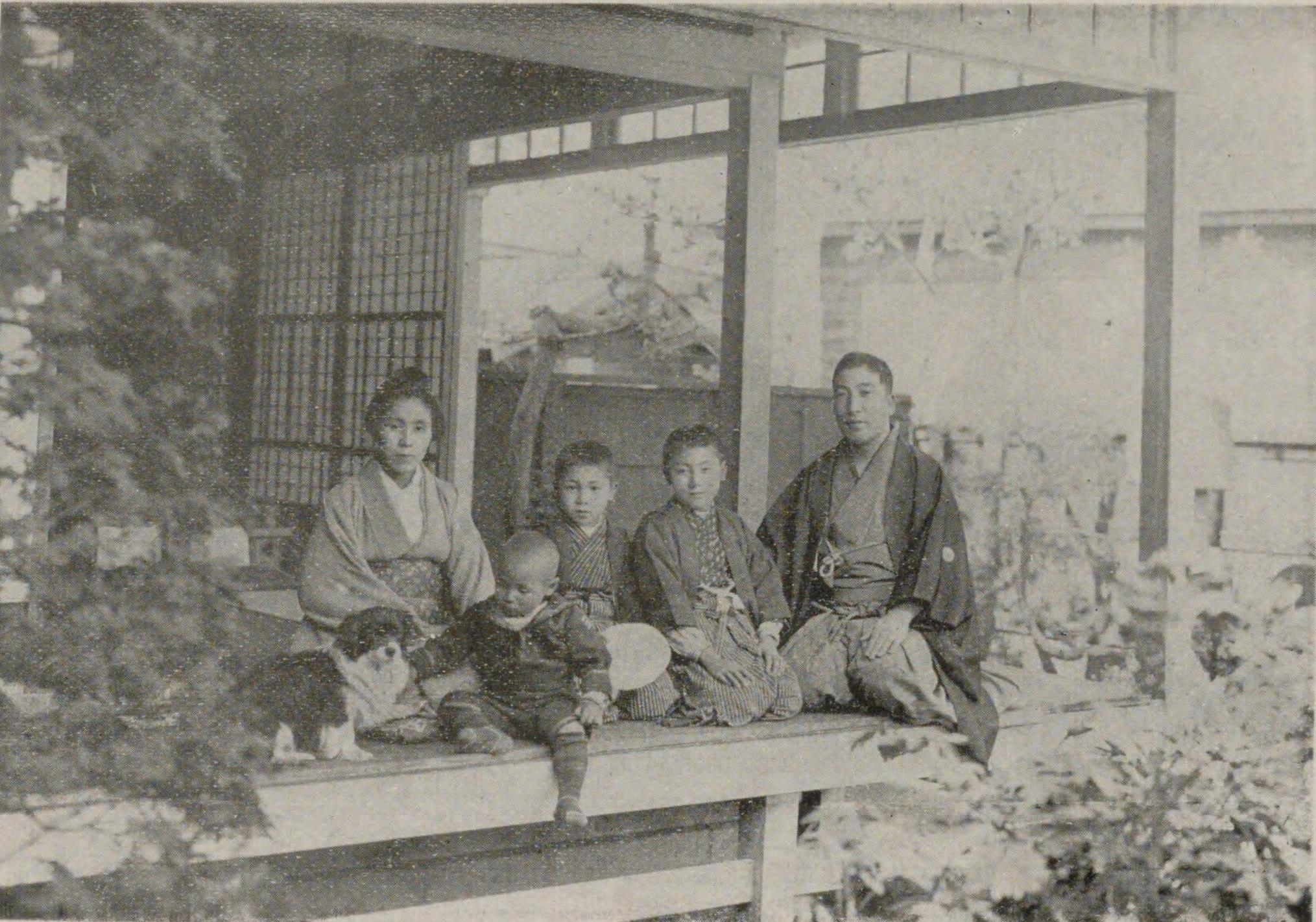 栗林五朔の壮年時代その二